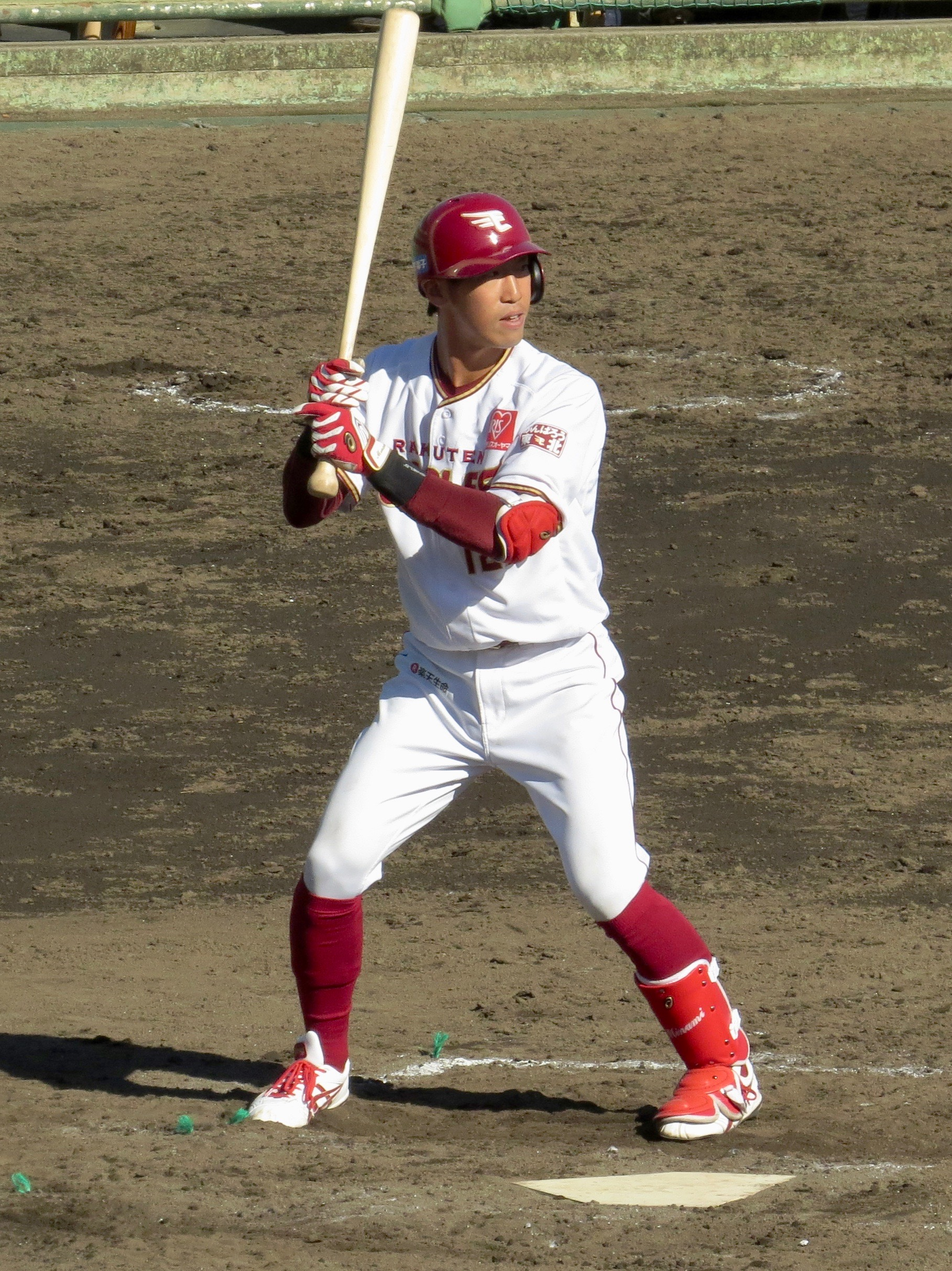 さいたま市営浦和球場にて